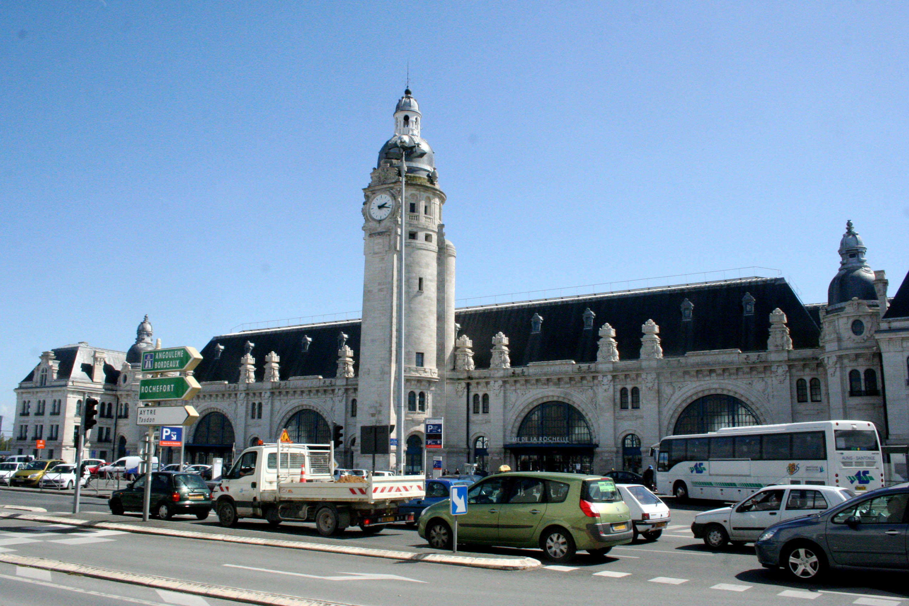 Gare de La Rochelle